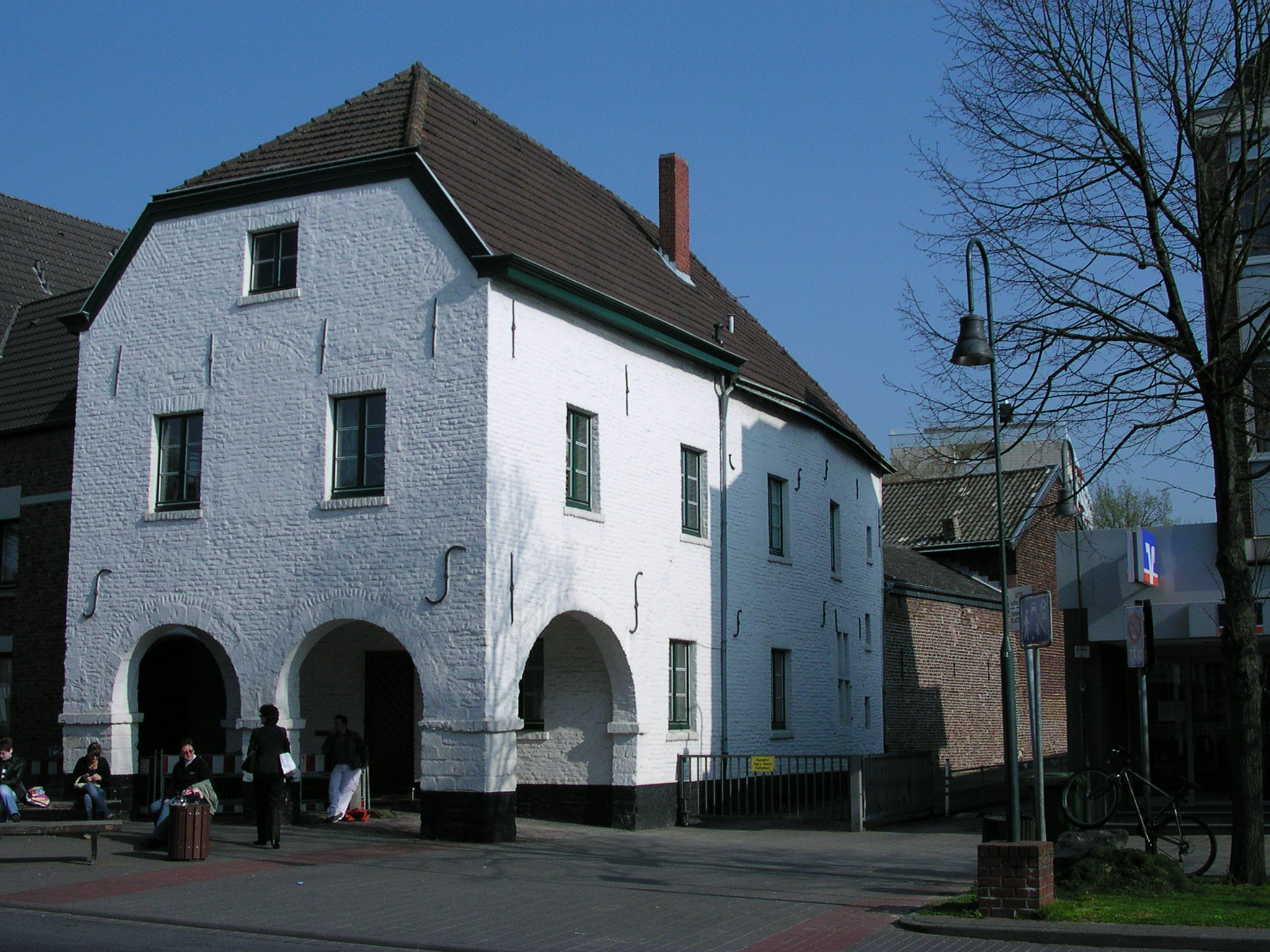 Aachen-Haaren, alter Zehnthof mit Arkadenbögen